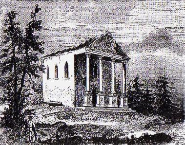 Kupferstich mit der Ansicht der Grabkapelle des Bergrats und Direktor der Bergakademie Kielce in Jaworzno